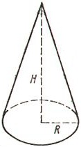 Наглядное пособие по вычислению объема конуса.